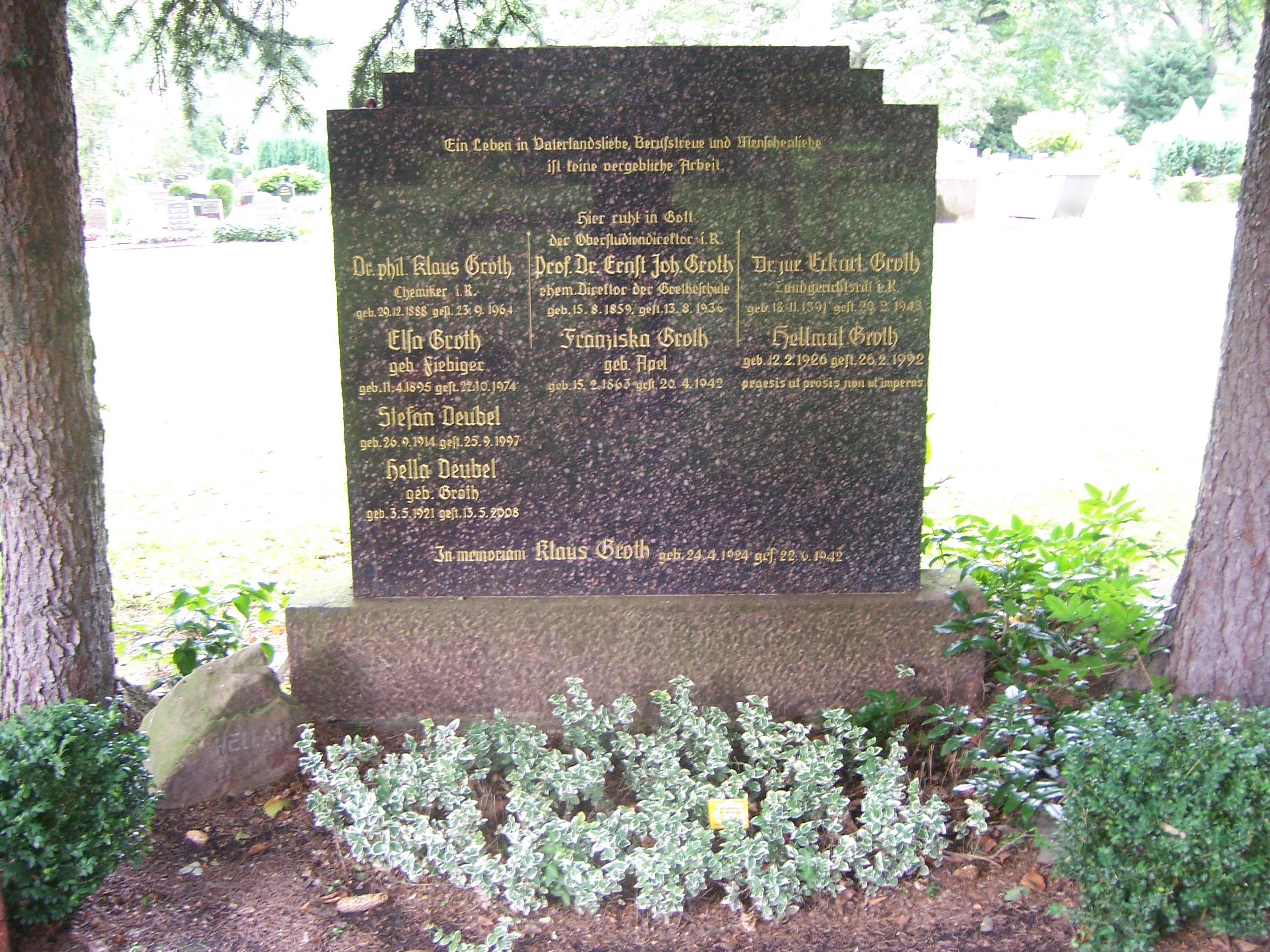 Grabstätte Prof. Groth